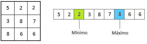 Detalhe mínimo e máximo